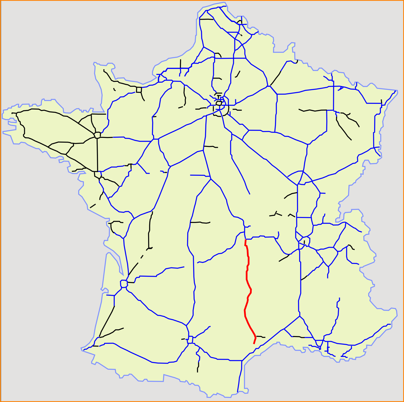 A75